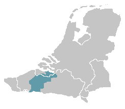 Oost-VlaamsTaalgebied